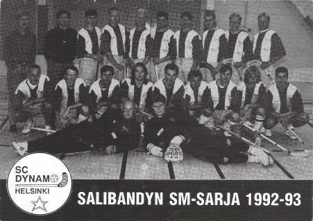 Joukkuekuva 1992-93